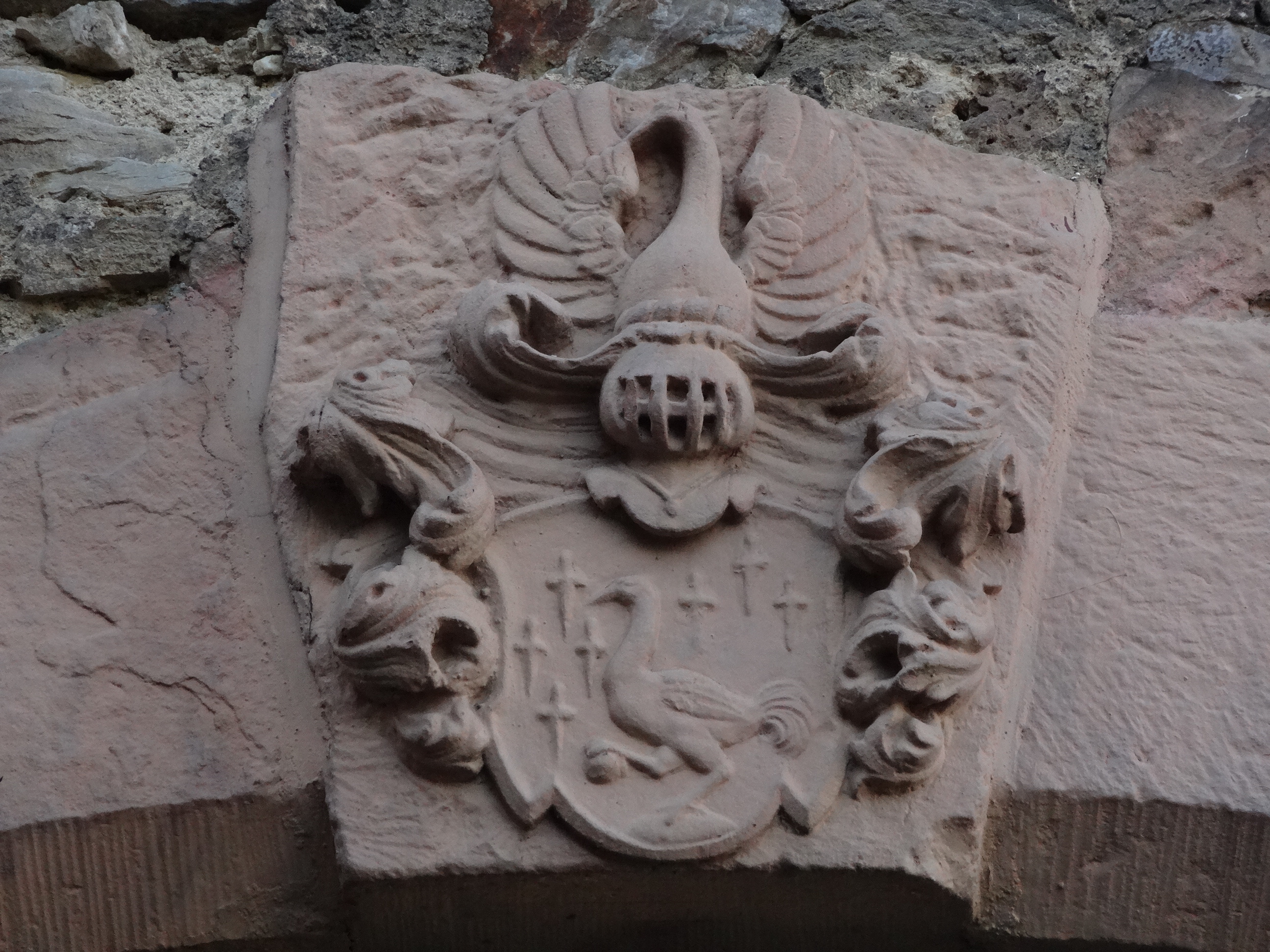 In der Burg 32 (Friedberg)